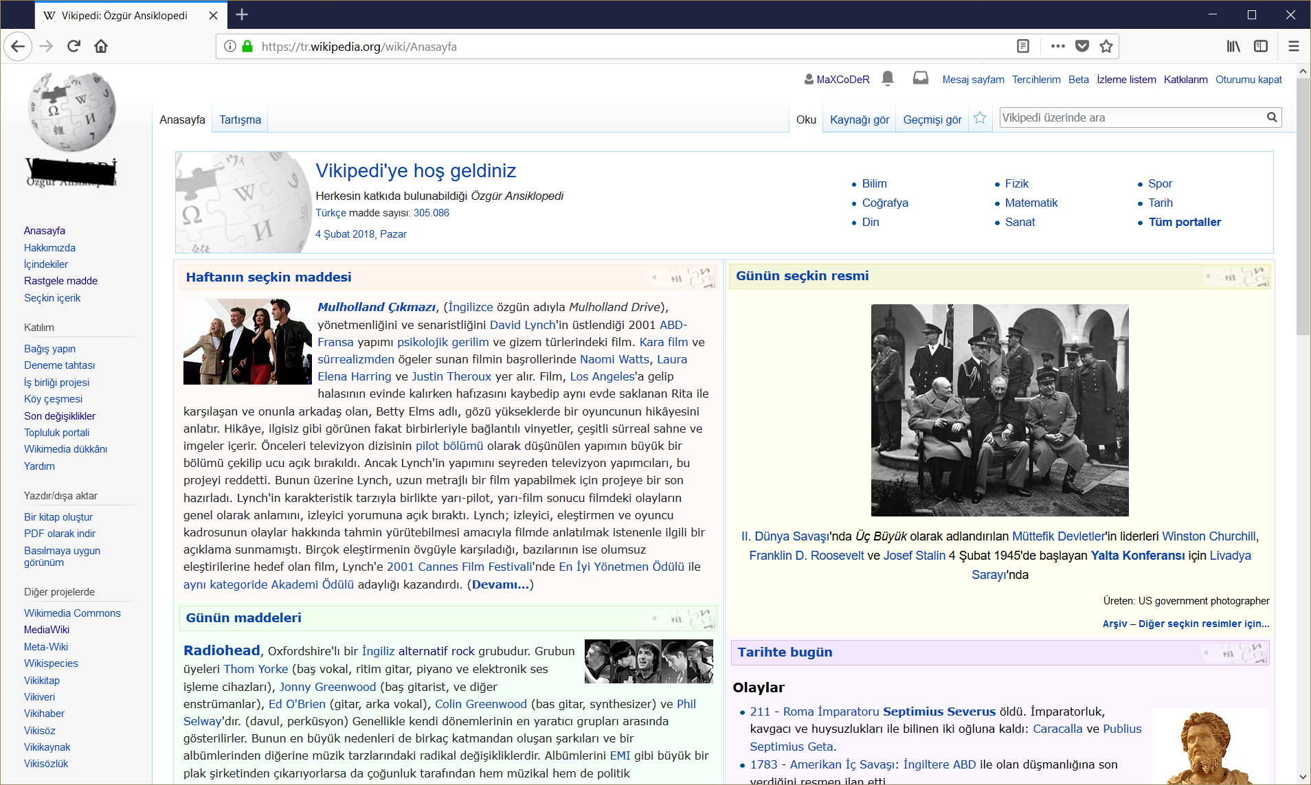 Windows 10'da Türkçe Firefox Nightly 60 ekran görüntüsü